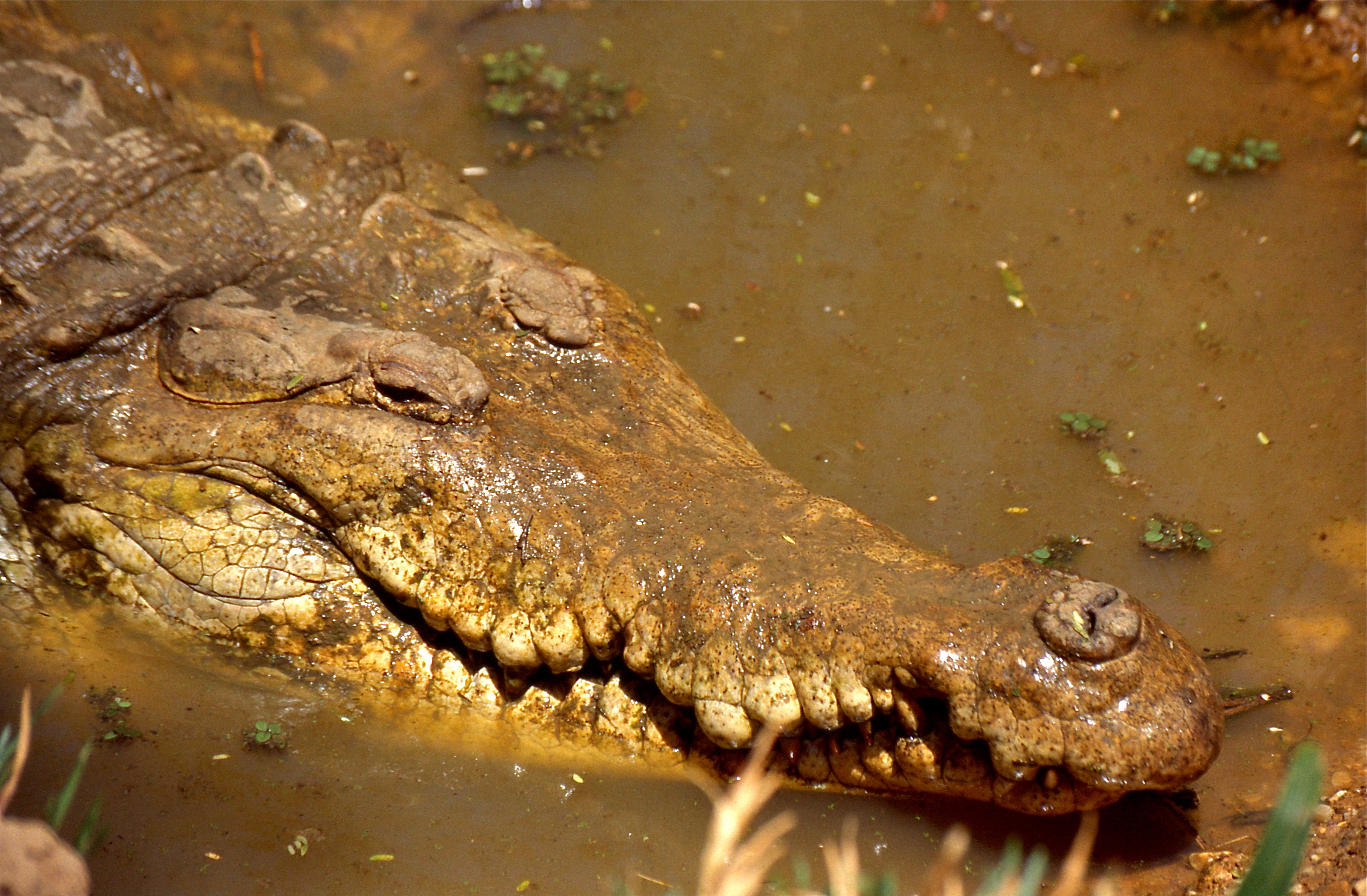 Captive Breeding Program, Hato Masaguaral, Francisco de Miranda, Guárico, Los LLanos, VENEZUELA Scanned Slide from March 1999